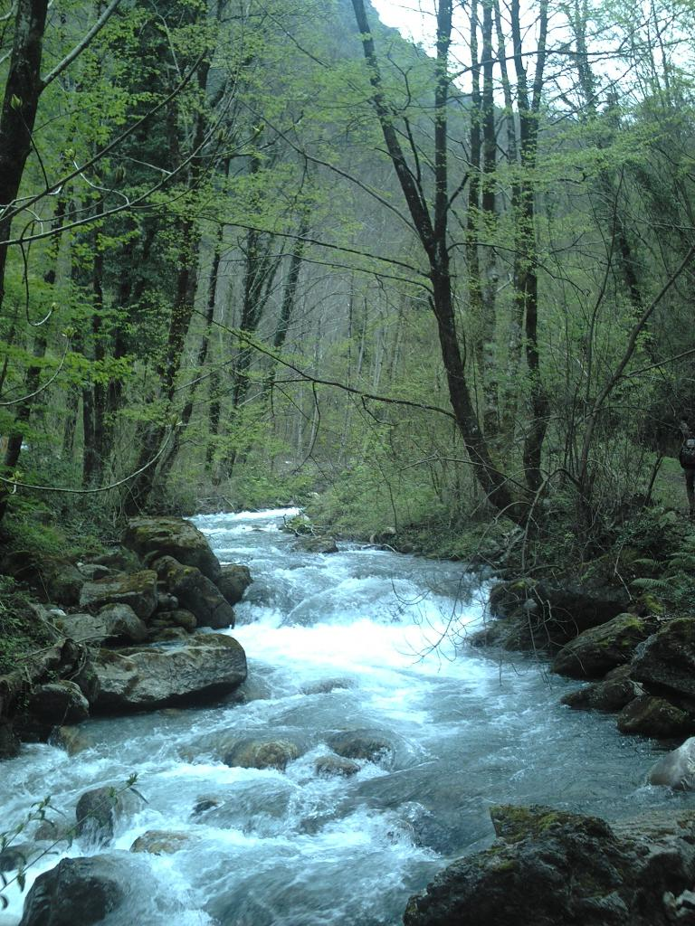 Autore della foto: Bruno Francesco Pileggi